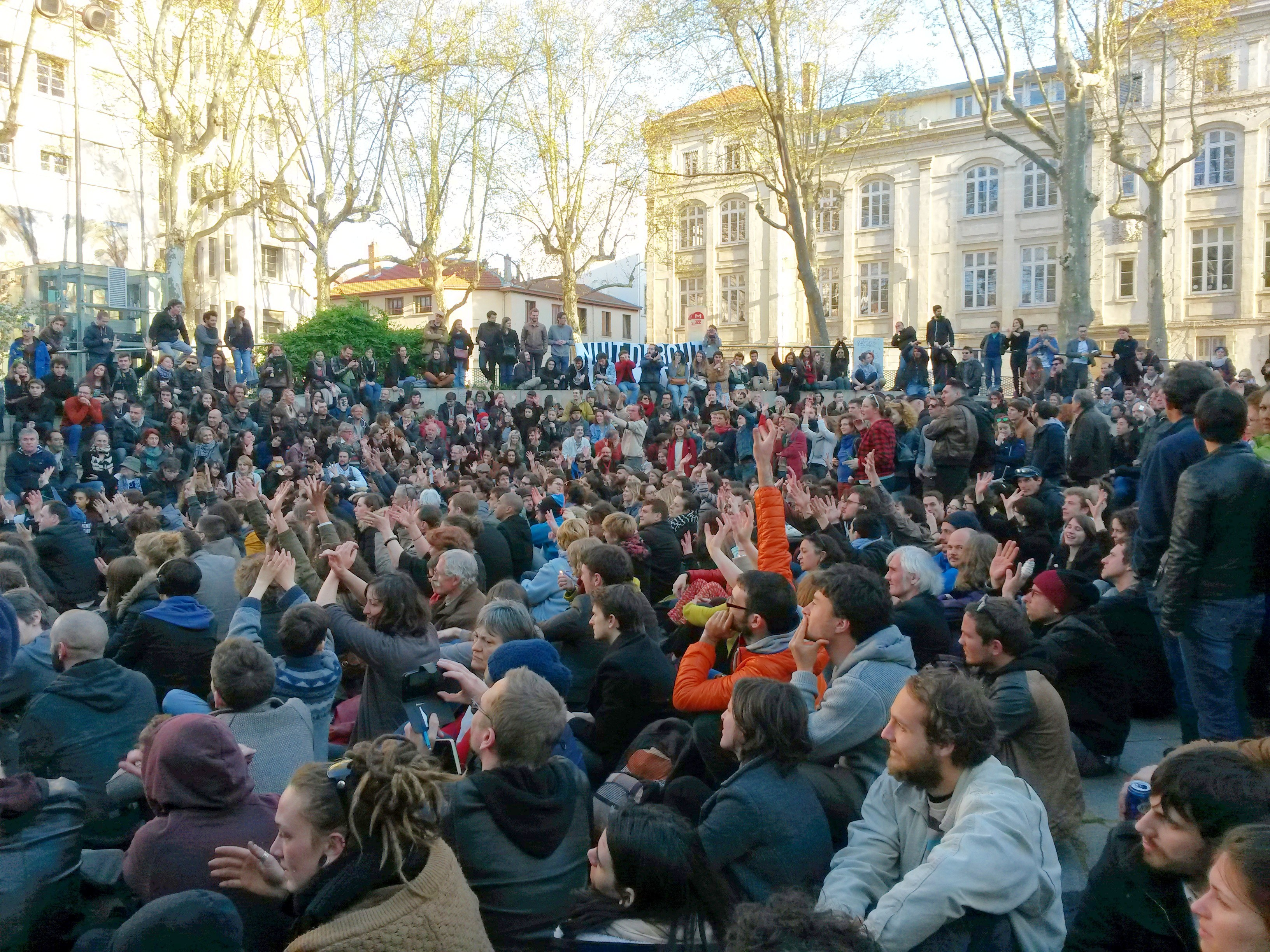 Assemblée Générale de la Nuit Debout Lyon, le 9 mars 2016, Place Guichard